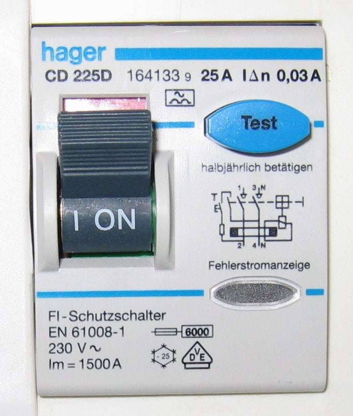 Fehlerstromschutzschalter, in einem Sicherungskasten eingebaut.